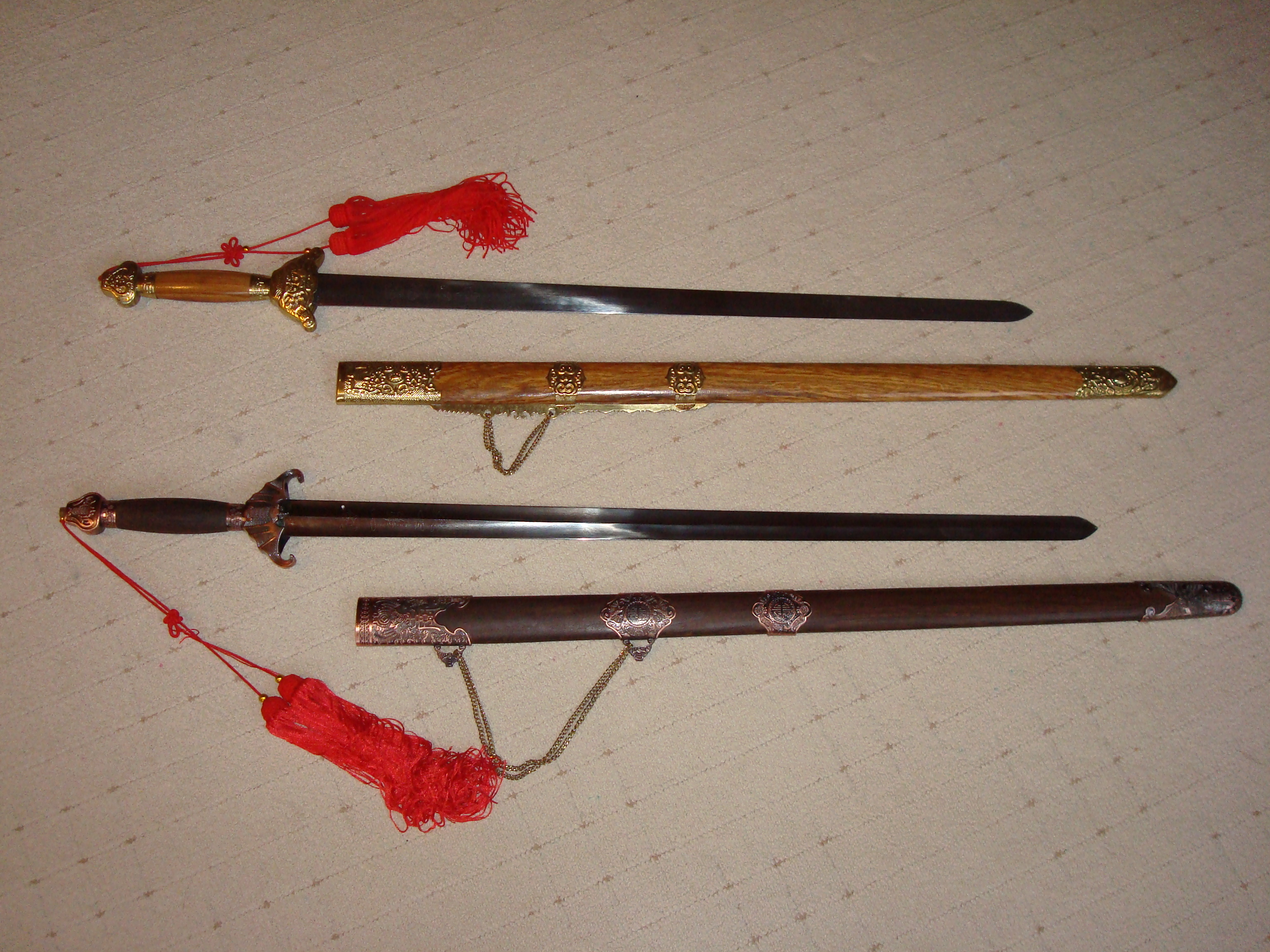 two Jian